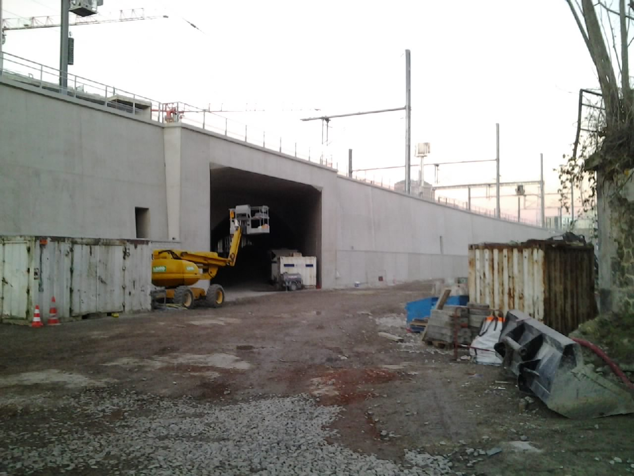 Emplacement de l'ancienne gare "Est-Ceinture" - Petite Ceinture (Paris 19e) - Décembre 2013